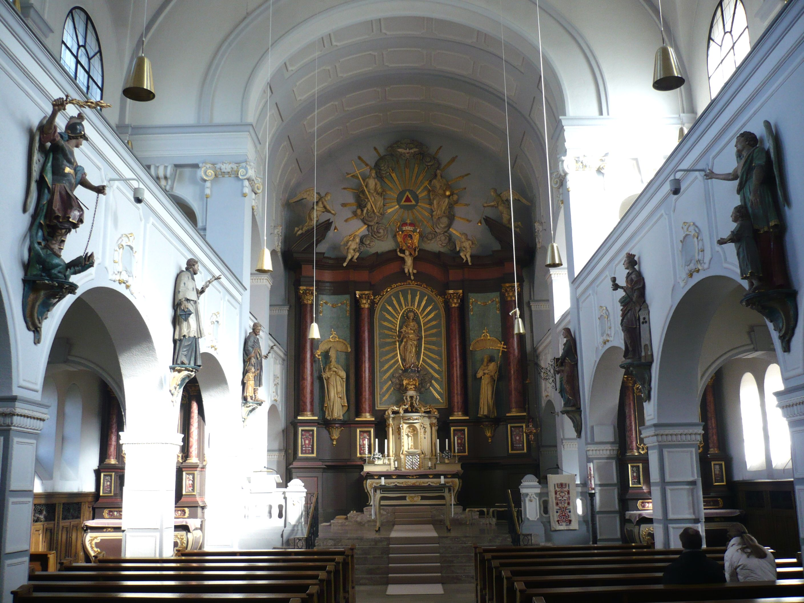 Elisabethkrankenhaus Essen: Kapelle Innenraum